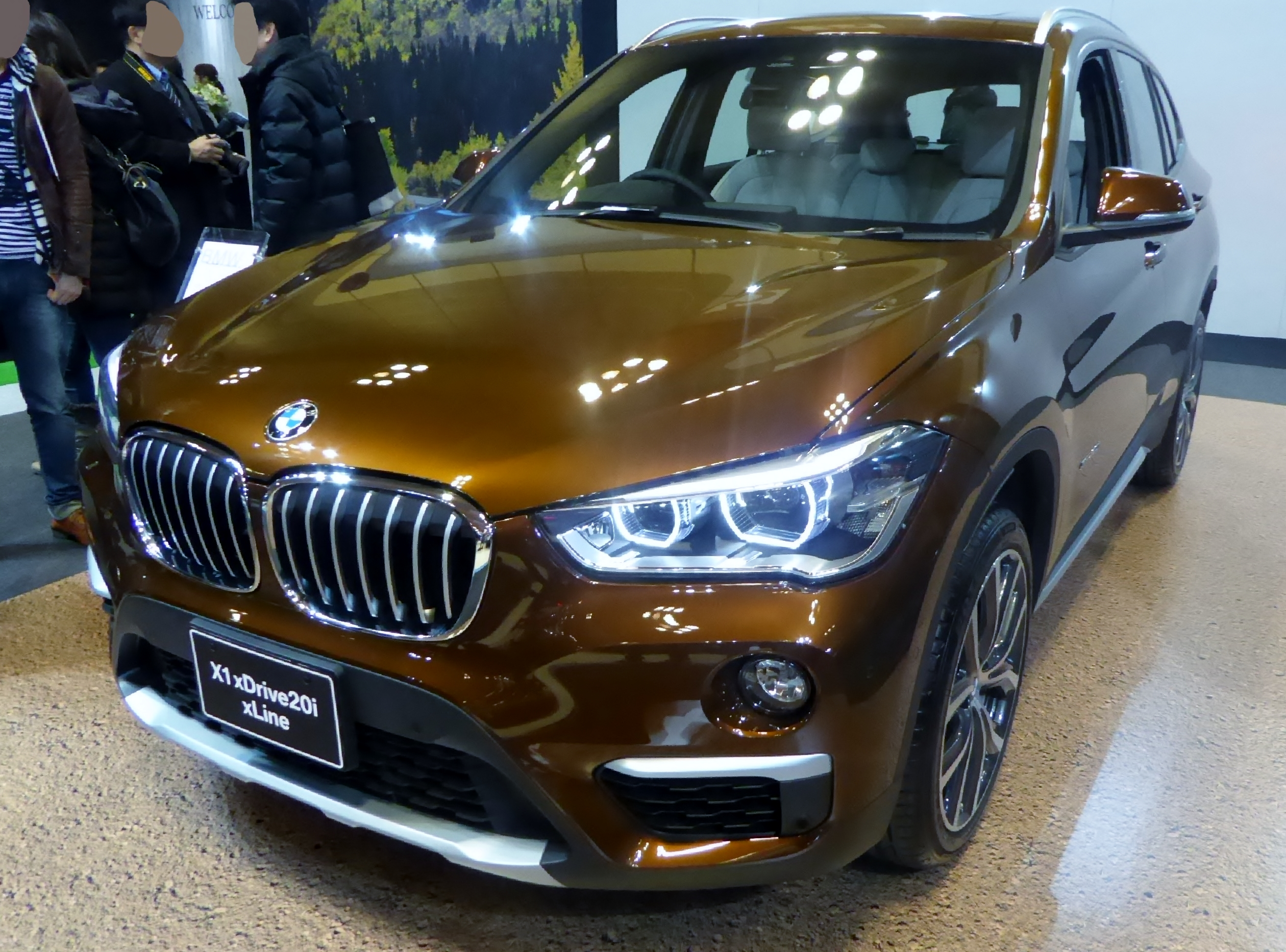 大阪モーターショー2015においてF48型BMW・X1 xDrive20i xLineを撮影。